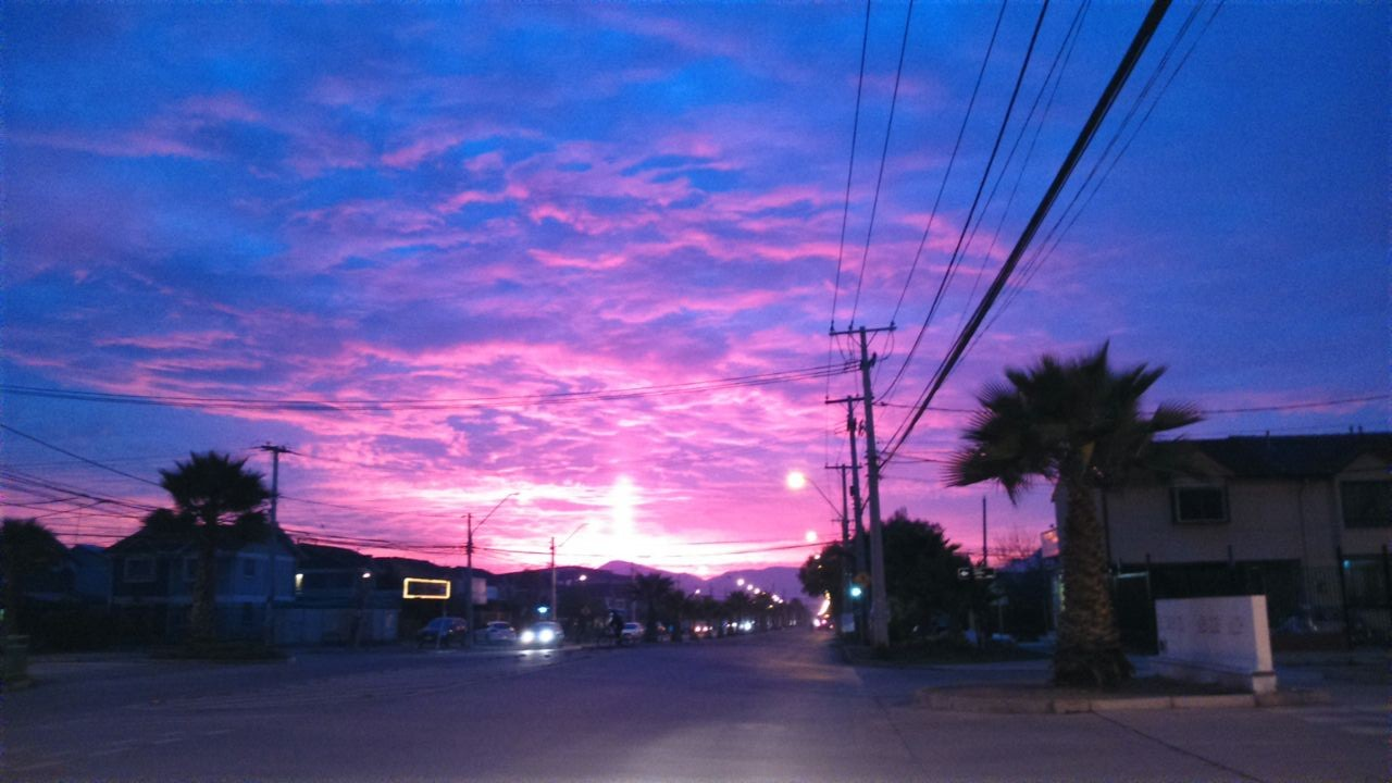 Atardecer en villa El Abrazo de Maipú. Santiago de Chile.